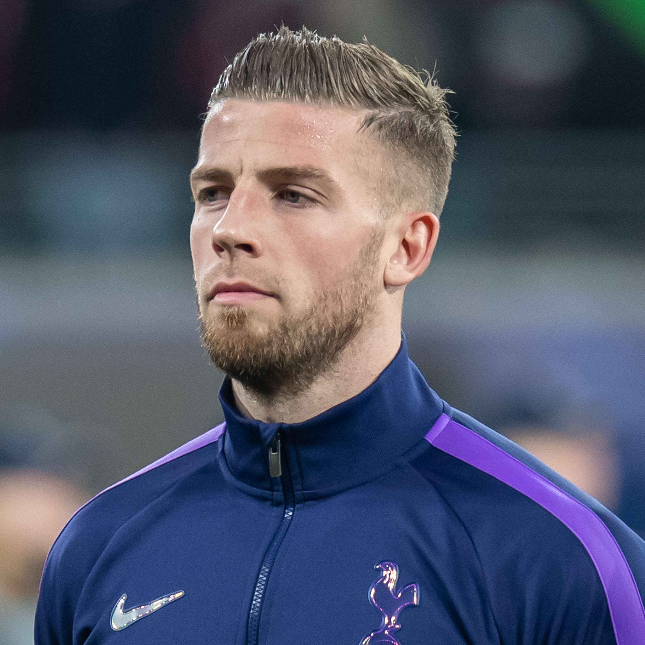 Fußball, Männer, UEFA Champions League Achtelfinale, RB Leipzig - Tottenham Hotspur; Toby Alderweireld (Tottenham Hotspur, 4)